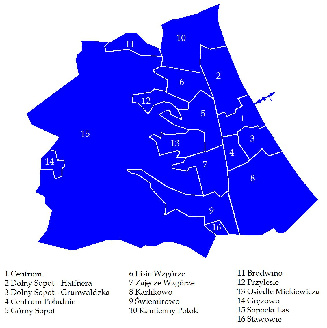 Sopot dzielnice